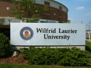 WLU-Hinweisschild mit Logo